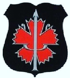 эмблема